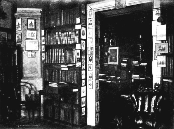 Интерьер усадьбы Покровское-Шереметьево